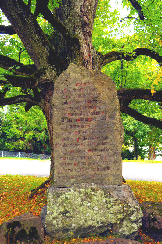 Eines der ältesten Vaterunser in Europa von Anno 814 steht in Stein gehauen in Wessobrunn in Oberbayern